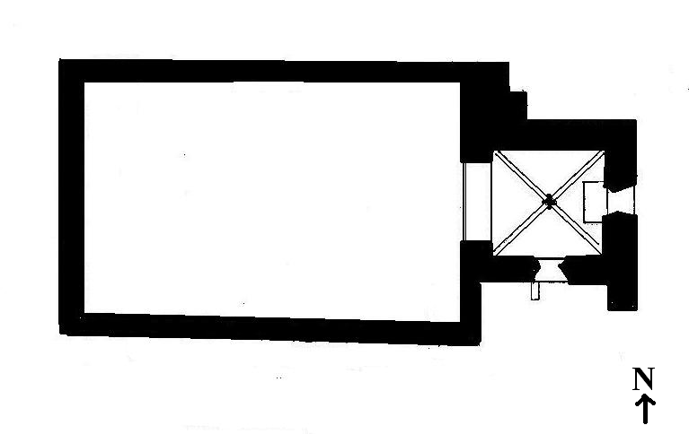 Heilbronn+Deutschordensmünster+als+romanische+Kirche+mit+Turmchor+um+1225.PNG